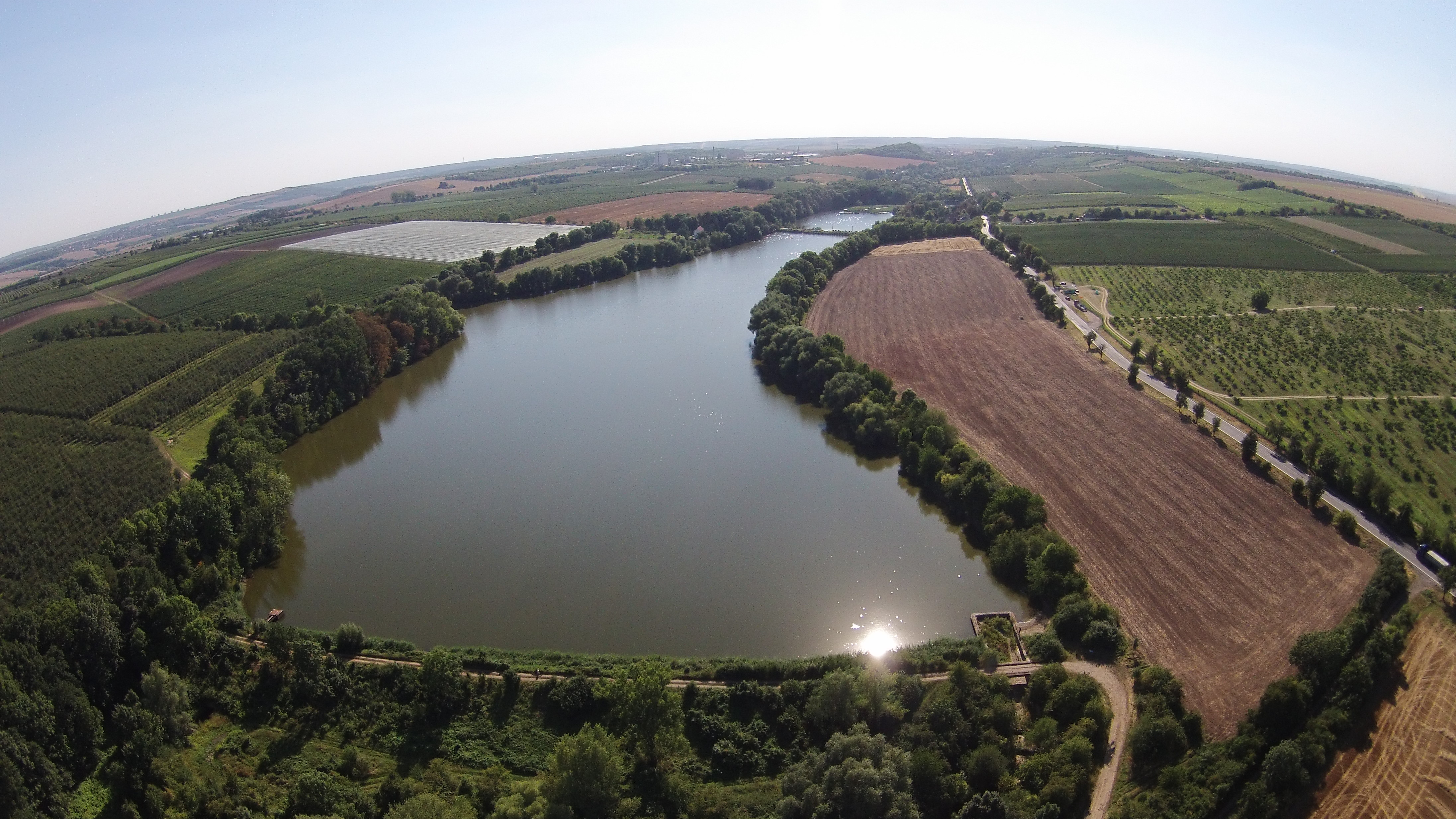 Blahotický rybník II, okres Kladno, Česká republika.